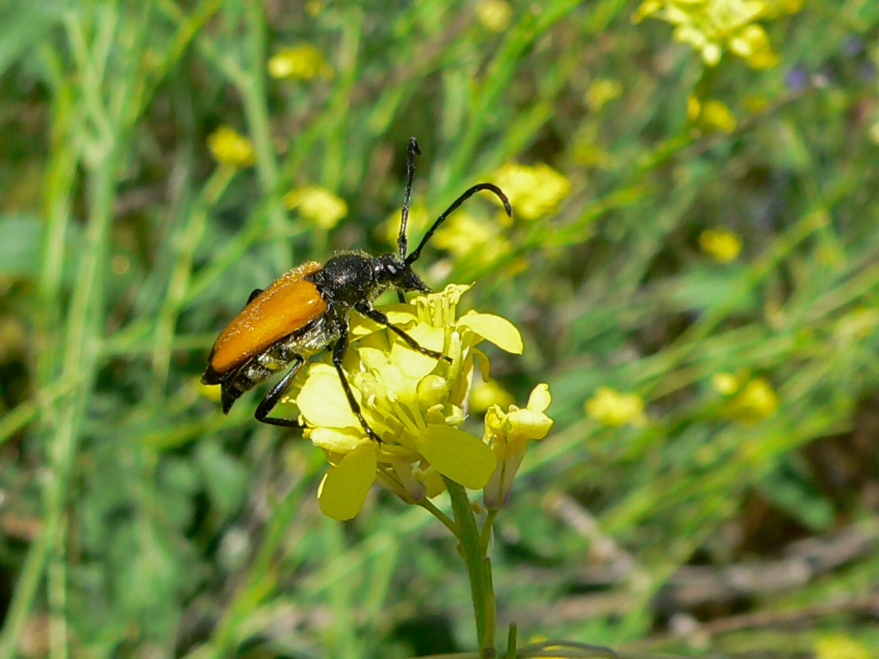 Octon, Hérault, FRANCE